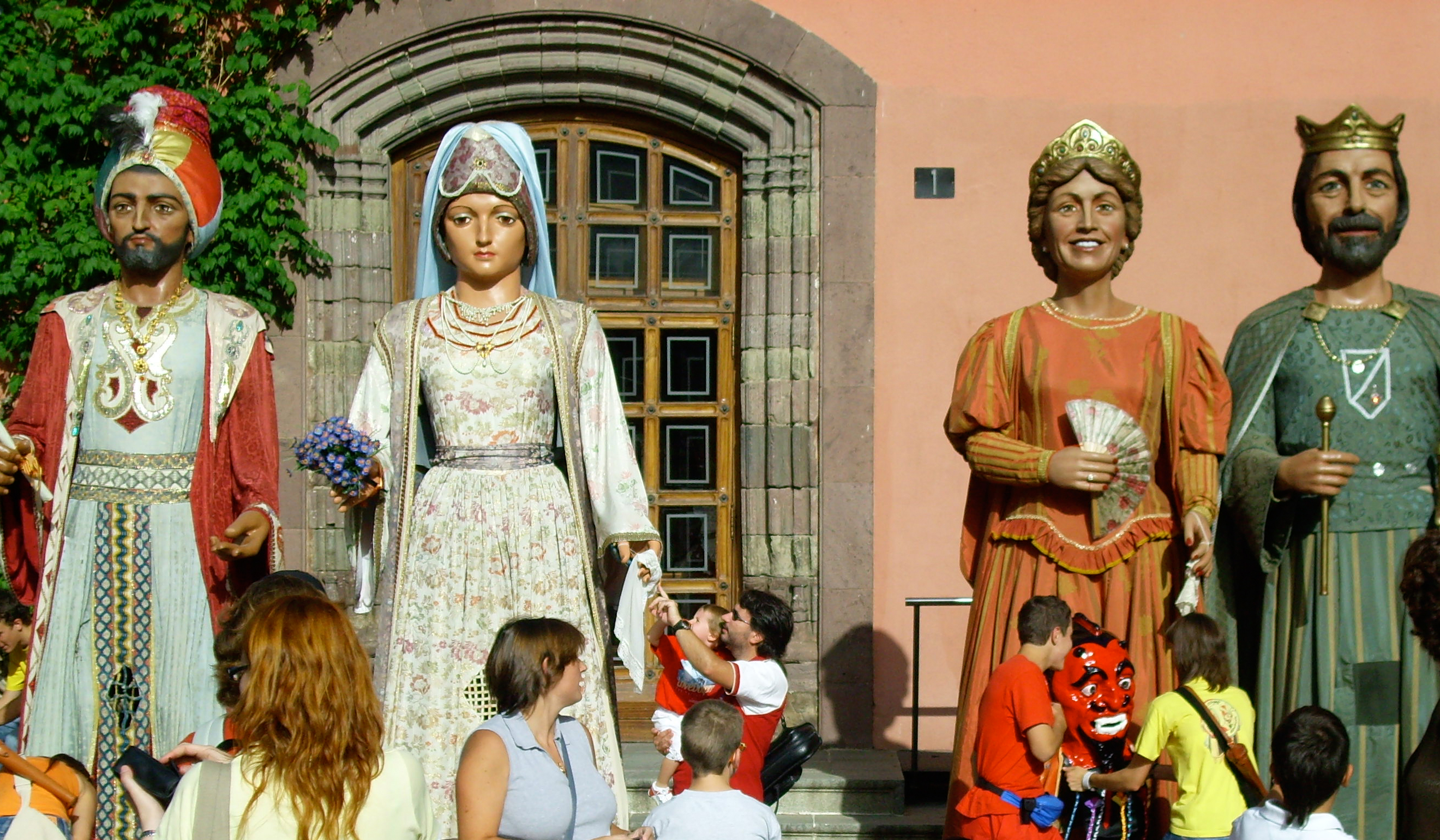 imatges de capgrossos i gegants de la Seu d'Urgell